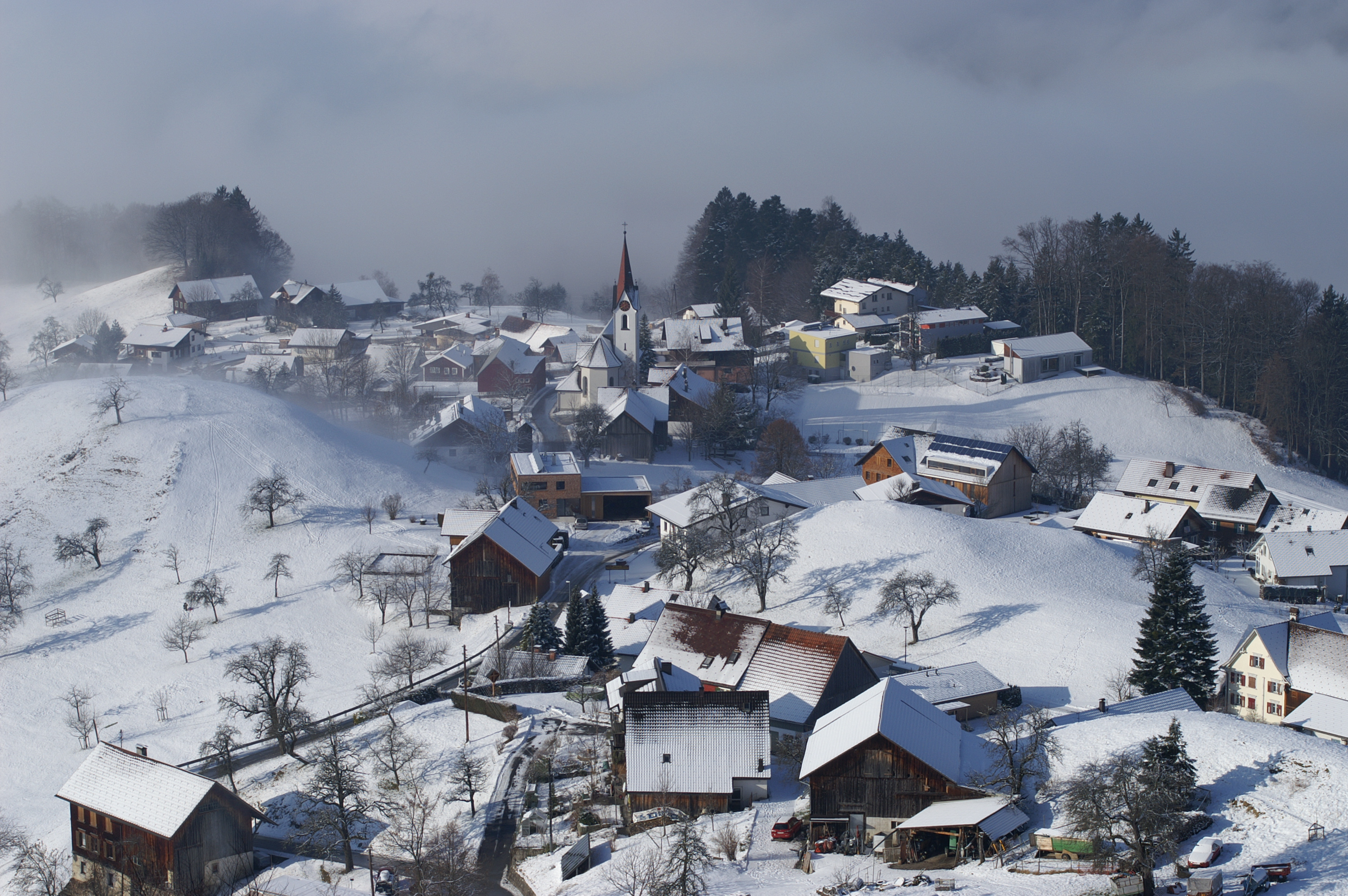 Blick von Oberberg/Morsch auf das Kirchdorf von Dafins. Im Rheintal dichter Nebel.